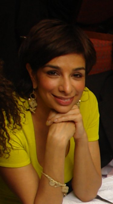 Shobna Gulati